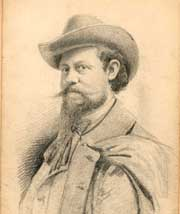 Portrait des Kunstmalers Ottomar Weymann